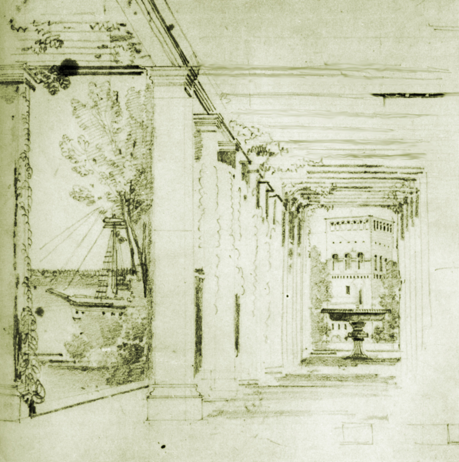 Eduard Biermann Klein Glienicke Blick durch die Nordpergola des Casinos, Skizze um 1842